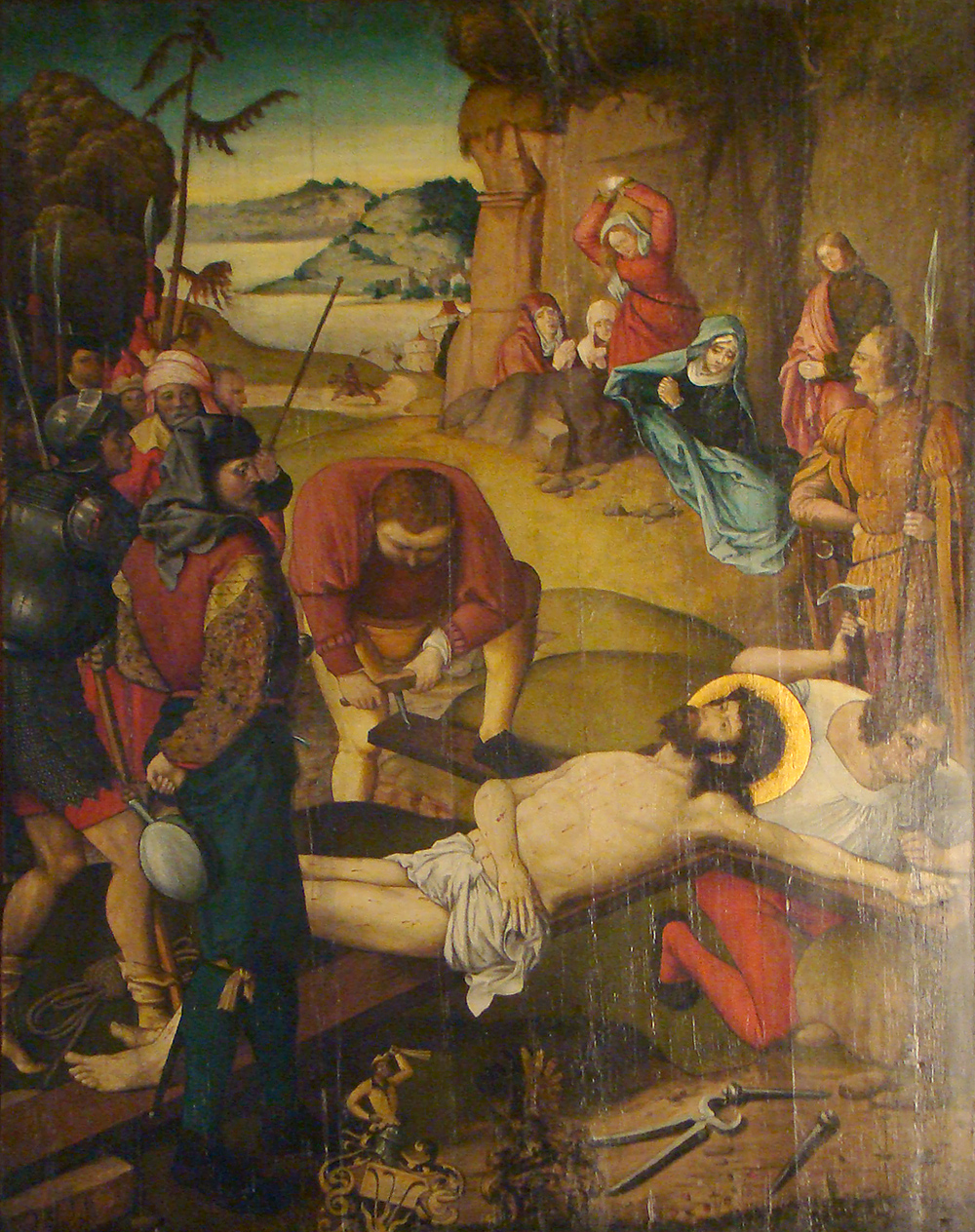 Altes Gemälde (Kreuzlegung Jesu) in der Stadtkirche Bad Wimpfen